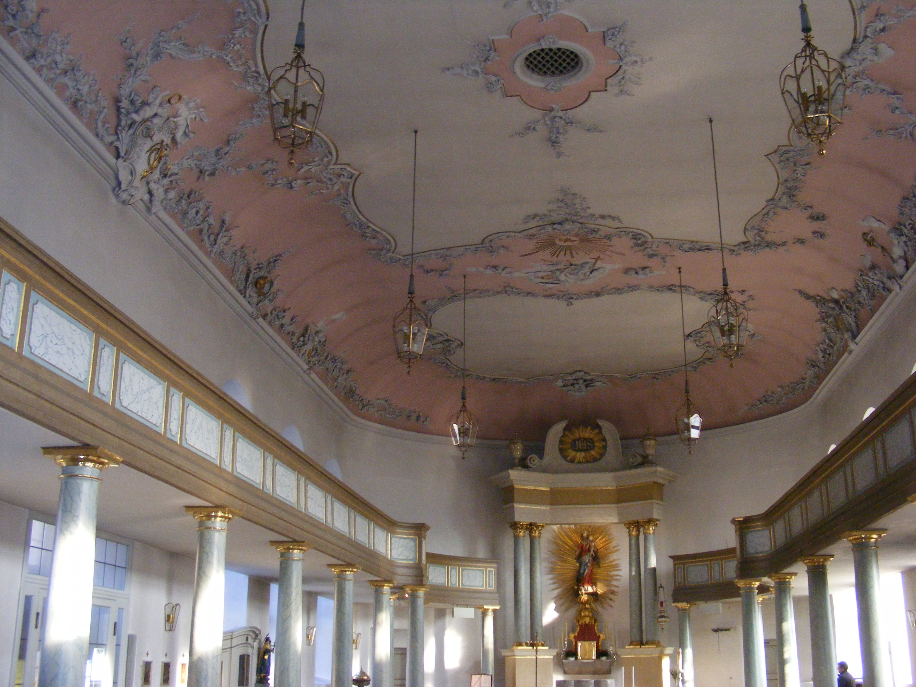 Bayreuth - Schlosskirche (Kirchenschiff), Fresko von Giovanni Battista Pedrozzi